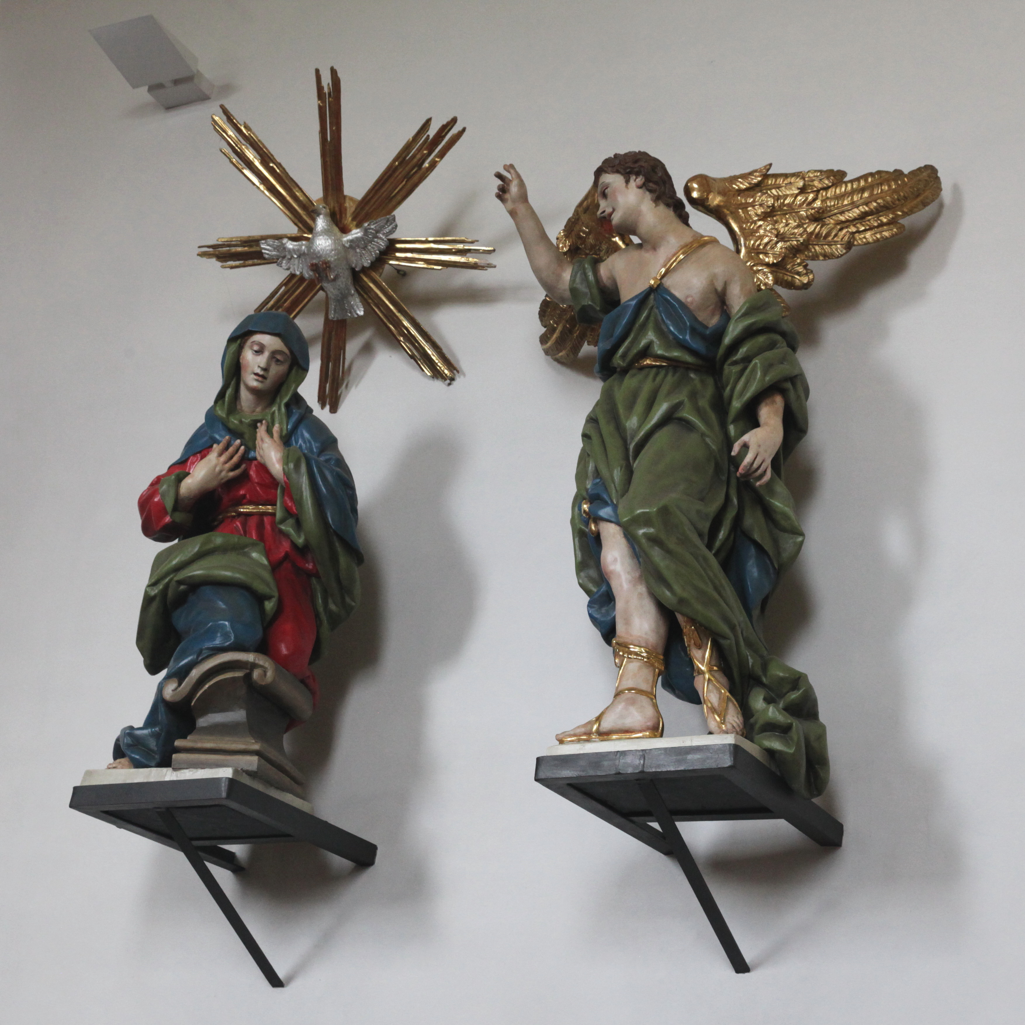 Verkündigungsgruppe, St. Johannes der Täufer, Witzmannsberg